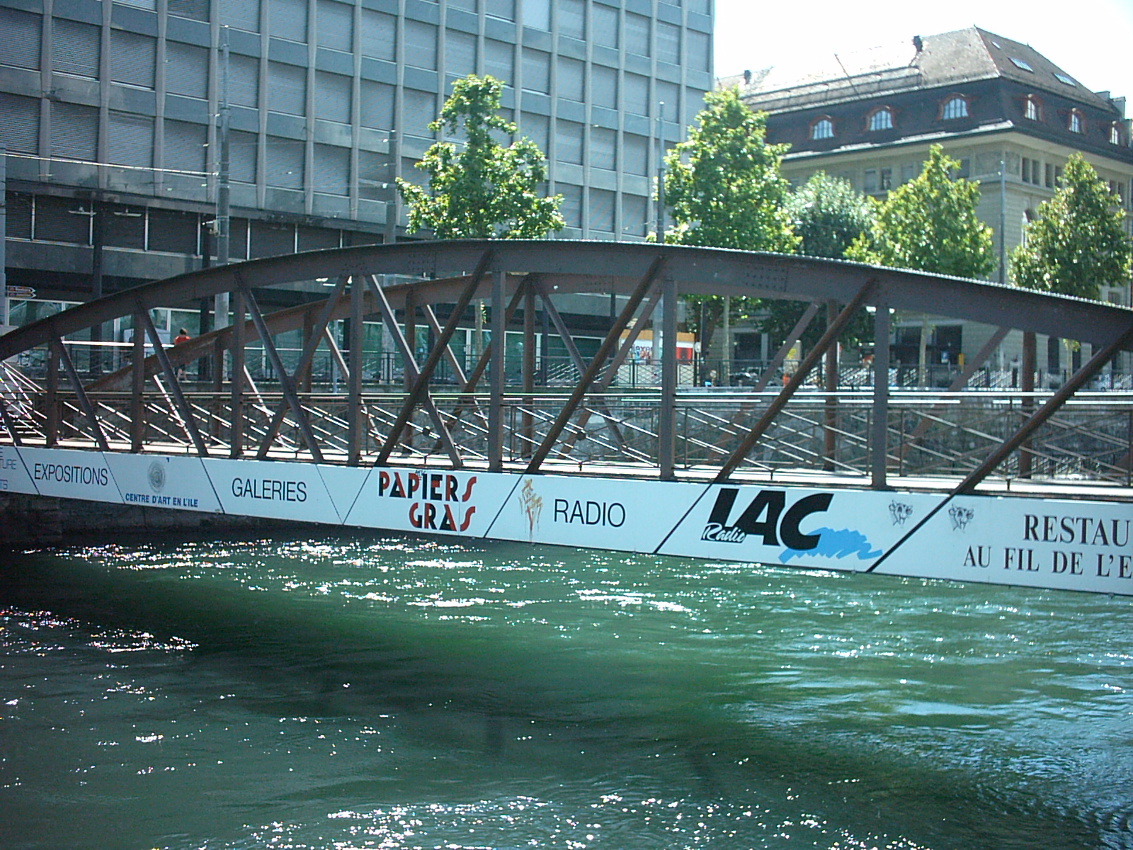 Passerelle de l'Île à Genève (Suisse)